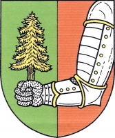 Býšovec, znak. V zeleno - červeně polceném štítě zleva vynikající stříbrné zlatě zdobené obrněné pravé rameno držící v drátěné rukavici zlatý smrk.